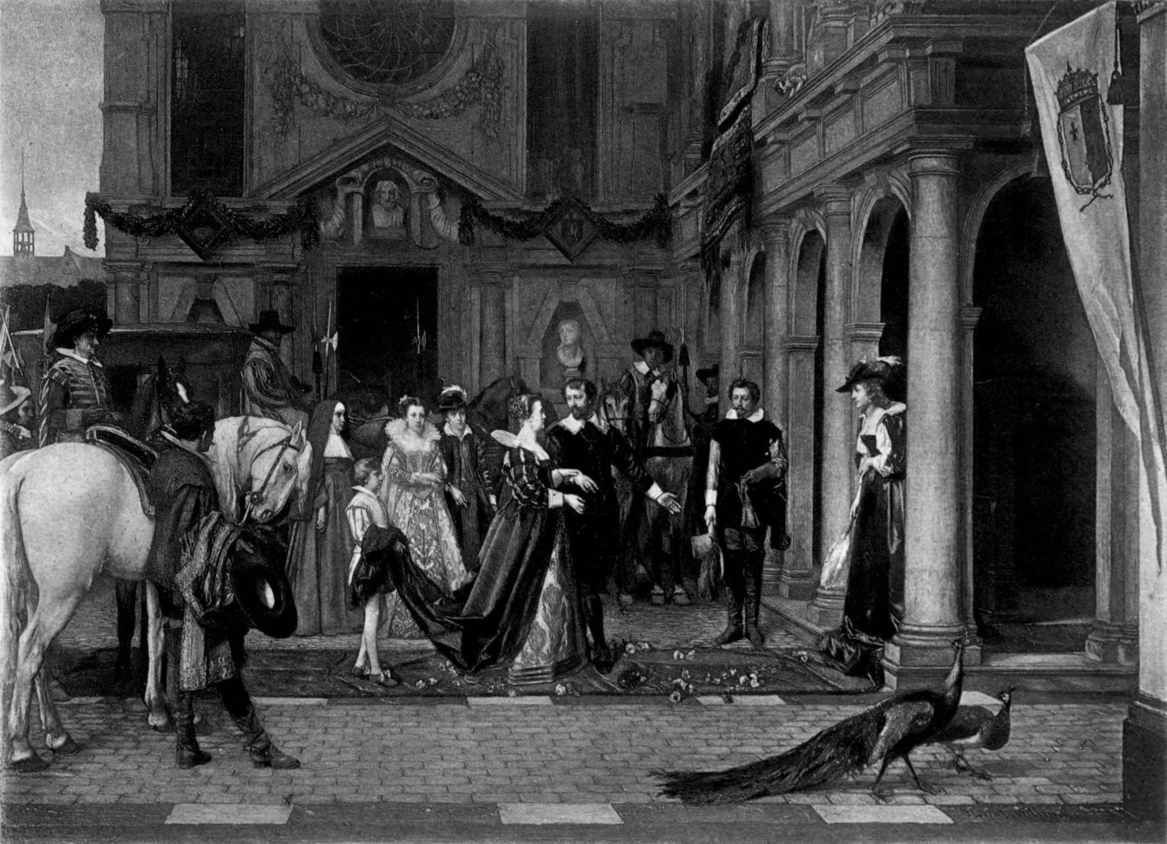 Marie de Médicis au domicile de Rubens